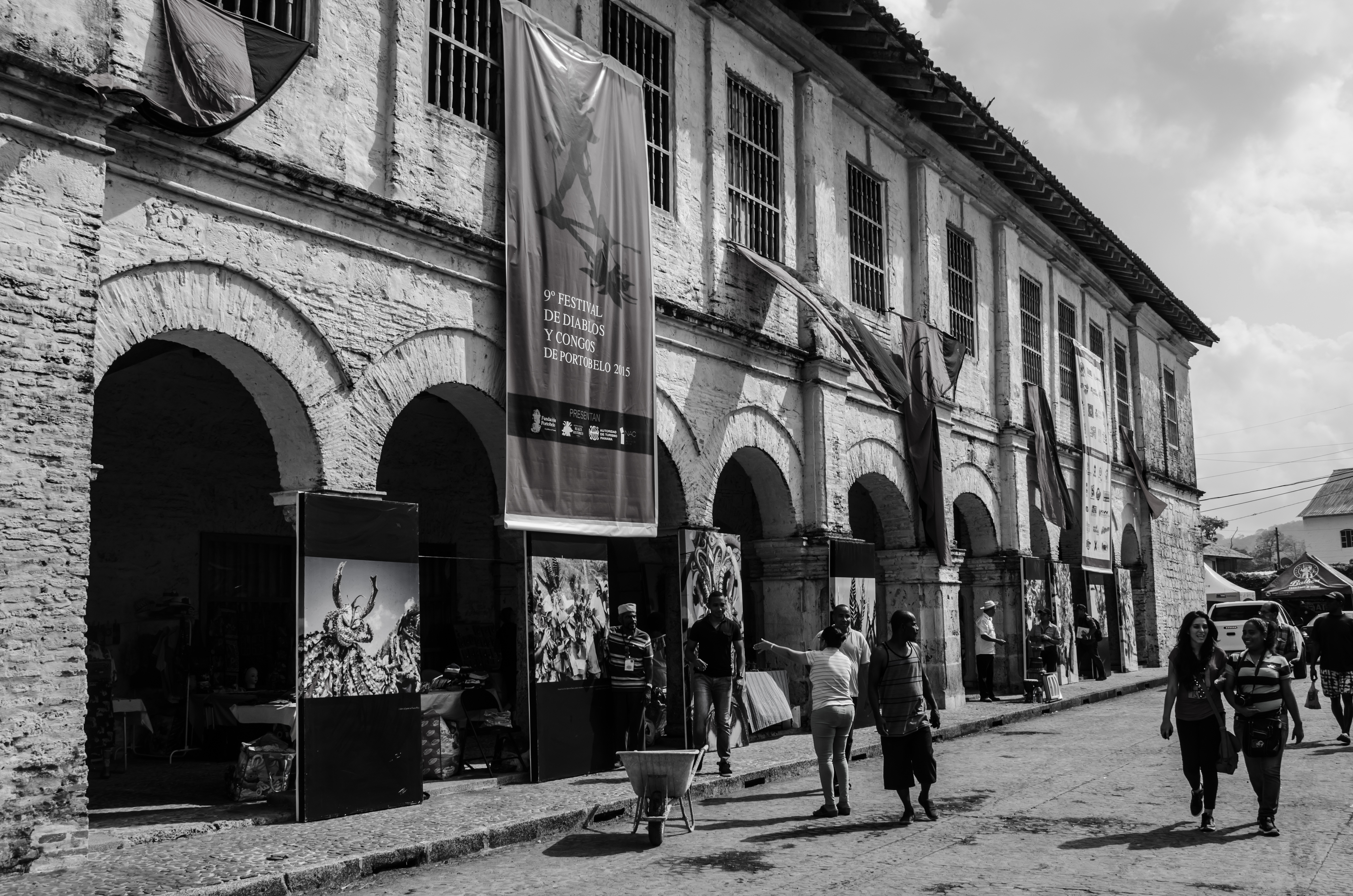 Aduana de Portobelo durante el Festival de Diablos y Pollera Conga